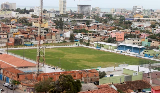 foto aerea do Estádio do Expedicionário